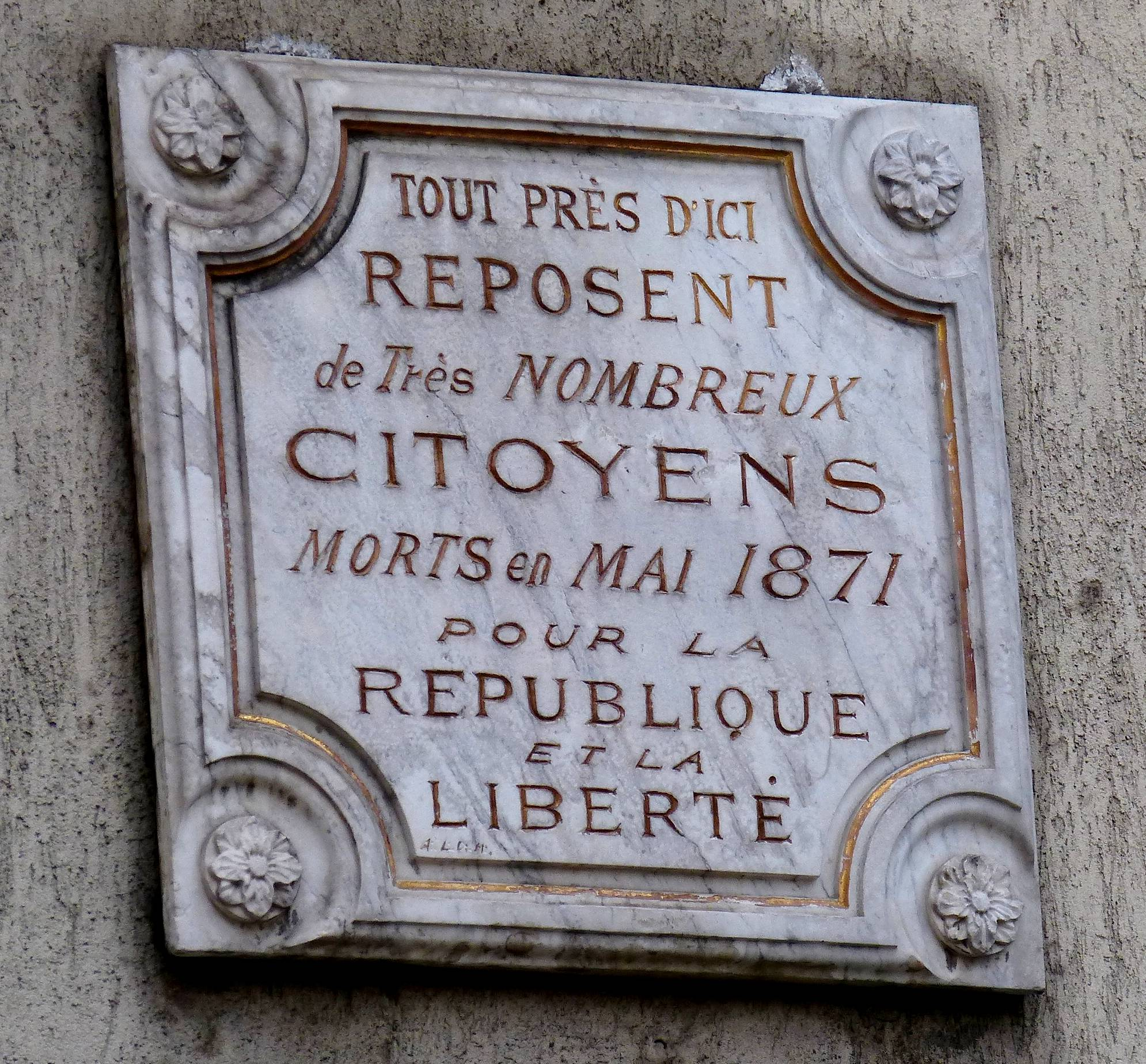 Plaque commémorative apposée sur l'immeuble du 1 rue de la Solidarité à Paris 19ème : « Tout près d'ici reposent de très nombreux citoyens morts en mai 1871 pour la République et la Liberté »